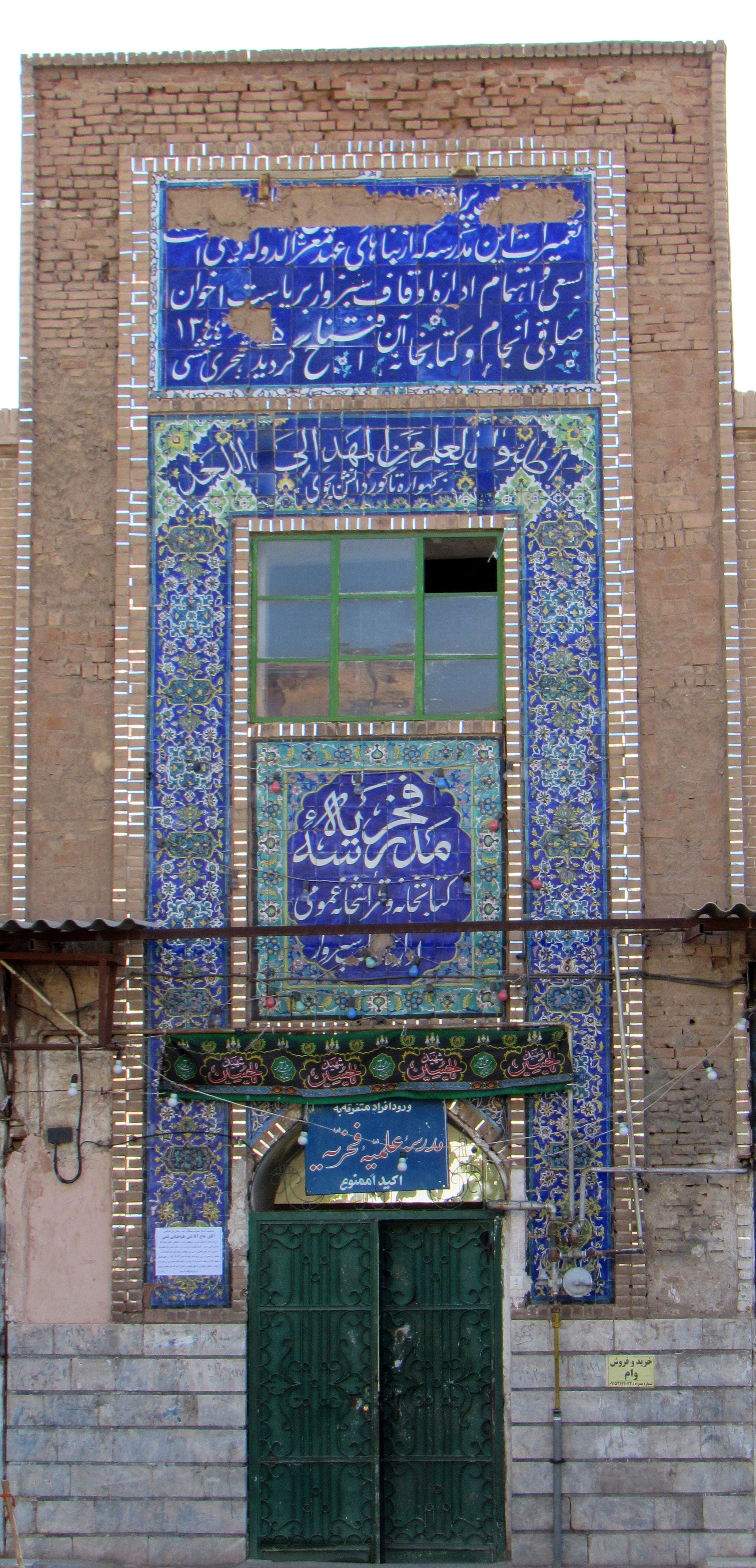 مدرسه فخریه سبزوار